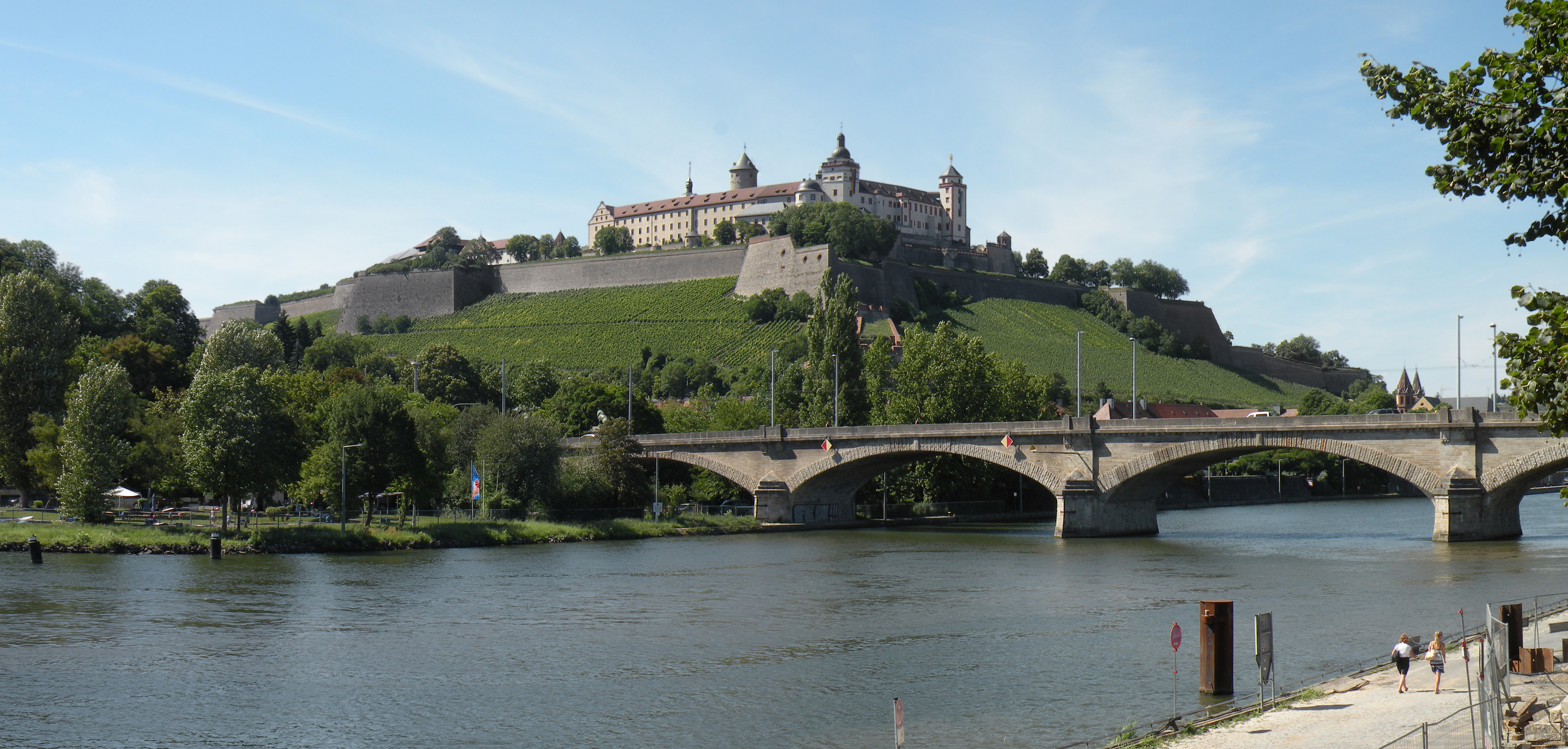 Würzburg: Main, Ludwig-Brücke und Festung Marienberg